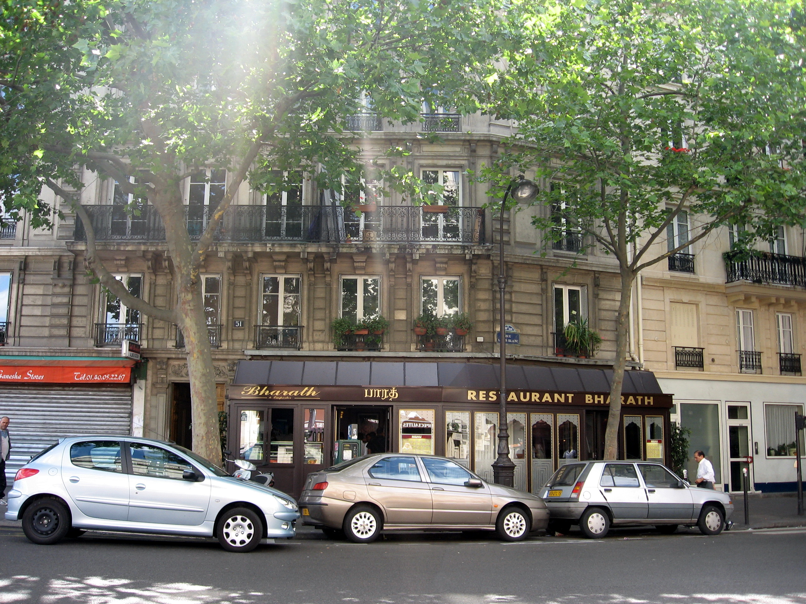 Immeuble où a été tourné une partie du film "Les Chansons d'amour" de Christophe Honoré, 51 rue Louis-Blanc dans le 10e arrondissement de Paris.